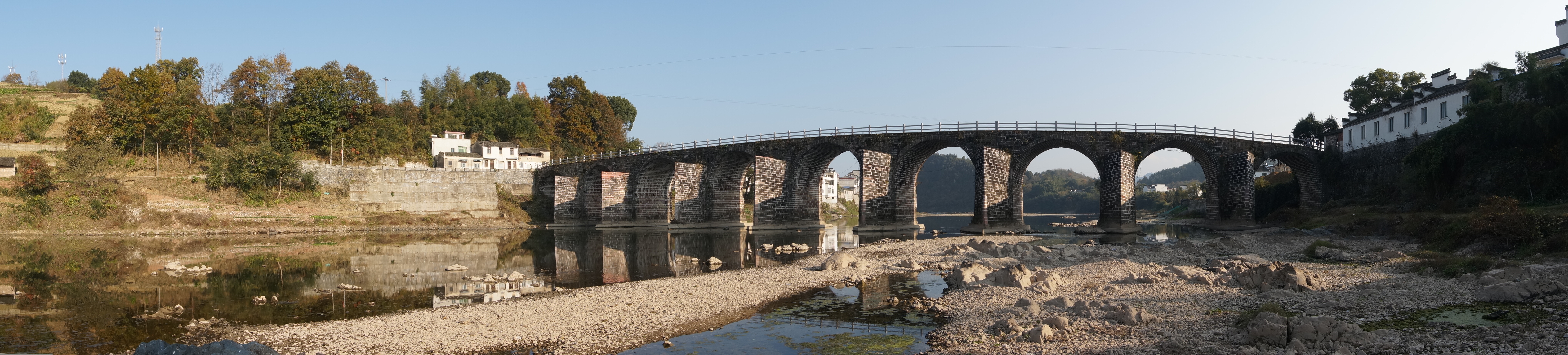 歙县紫阳桥，北侧全景。